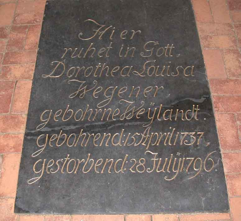 Fachwerkkirche Luckow, Inneres, Grabplatte Dorothea Weyland